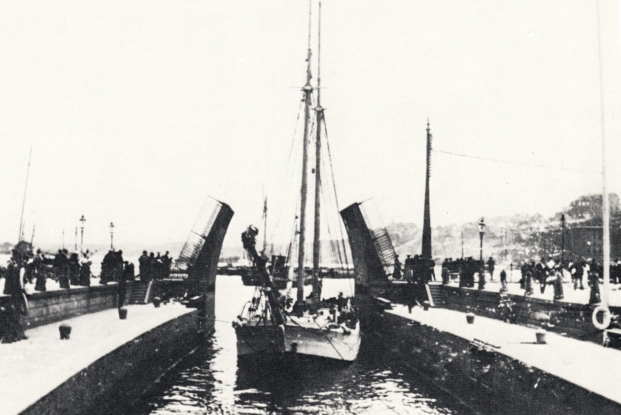 Slussen, dans la ville de Stockholm, en 1890.